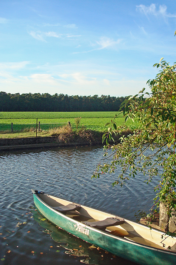 Am Wapelbad, Gütersloh